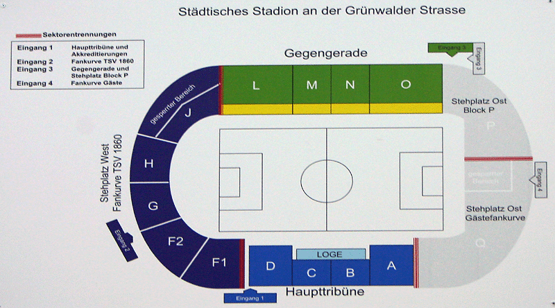 Schild am 60er Stadion